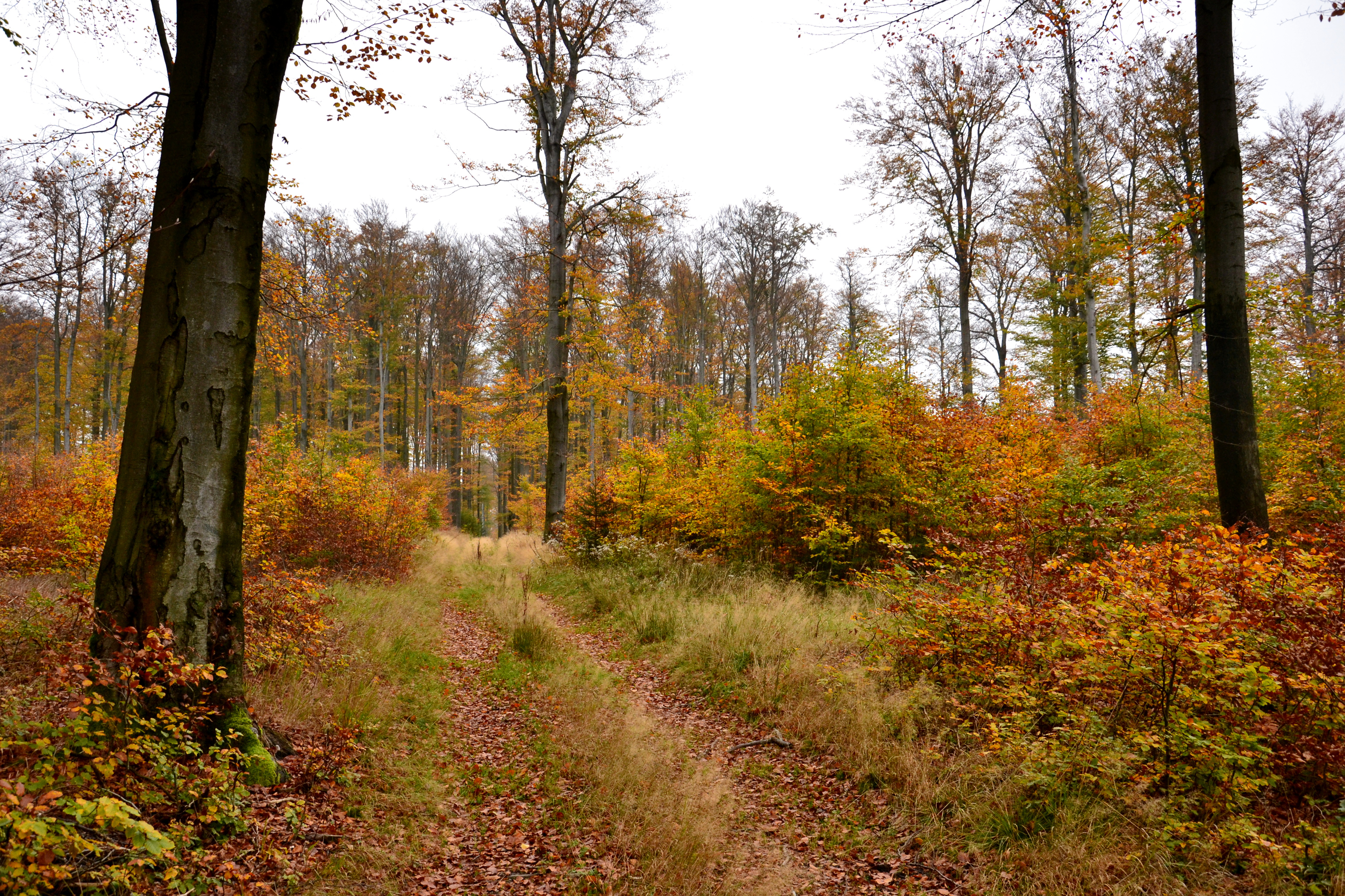 Bučina na Kienhaidě - mýtina